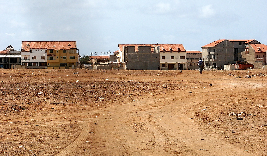 Le village de Santa Maria sur l'île de Sal